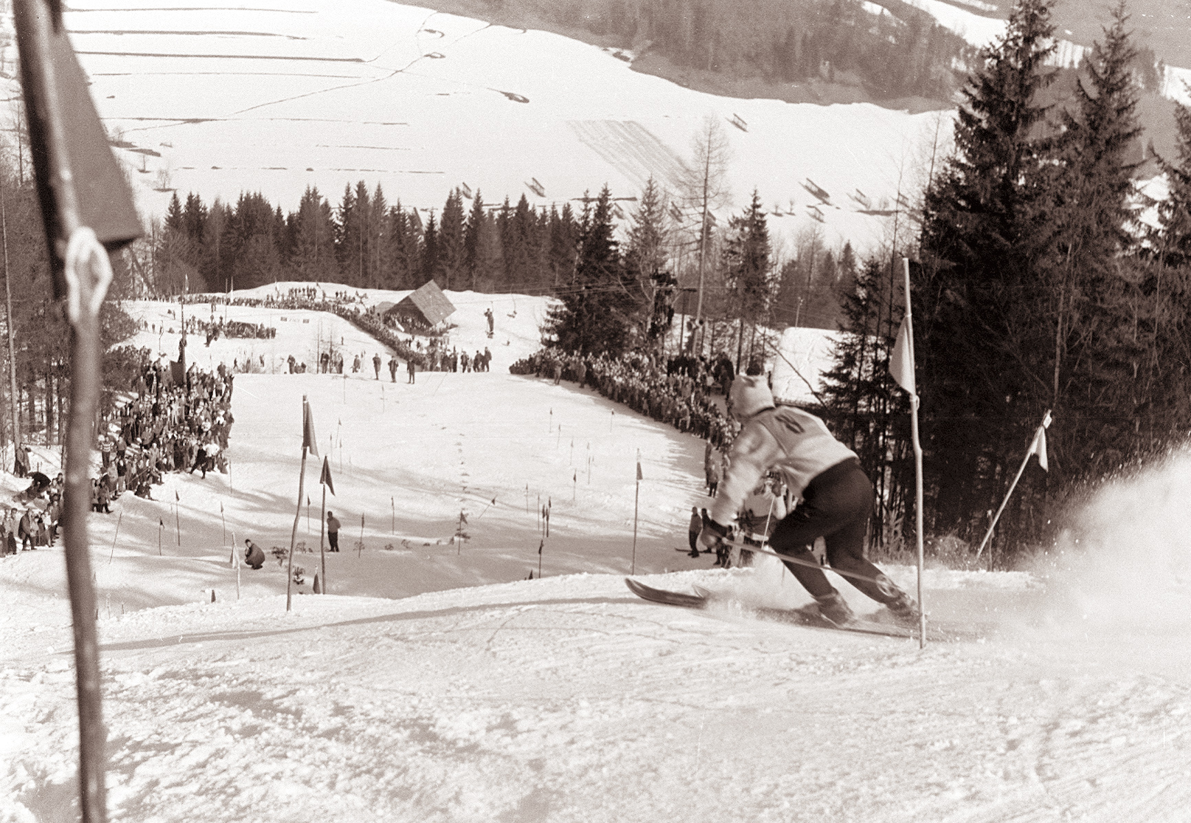 Prvi Pokal Vitranc v Kranjski Gori